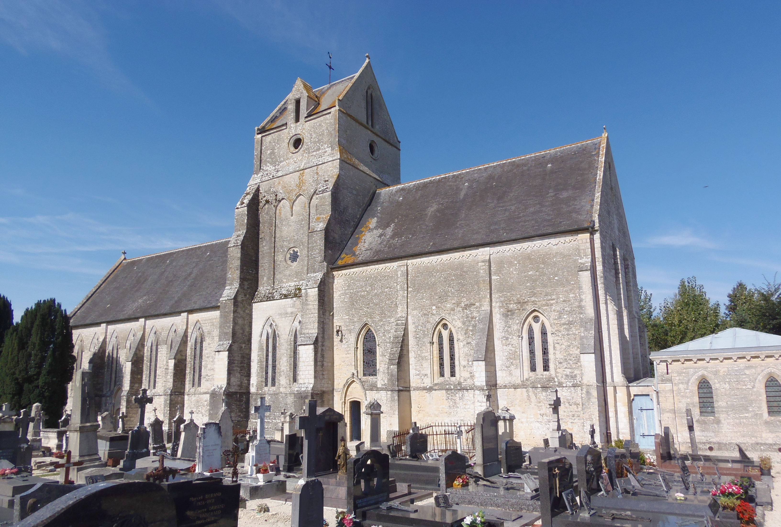 Mosles (Normandie, France). L'église Saint-Eustache.